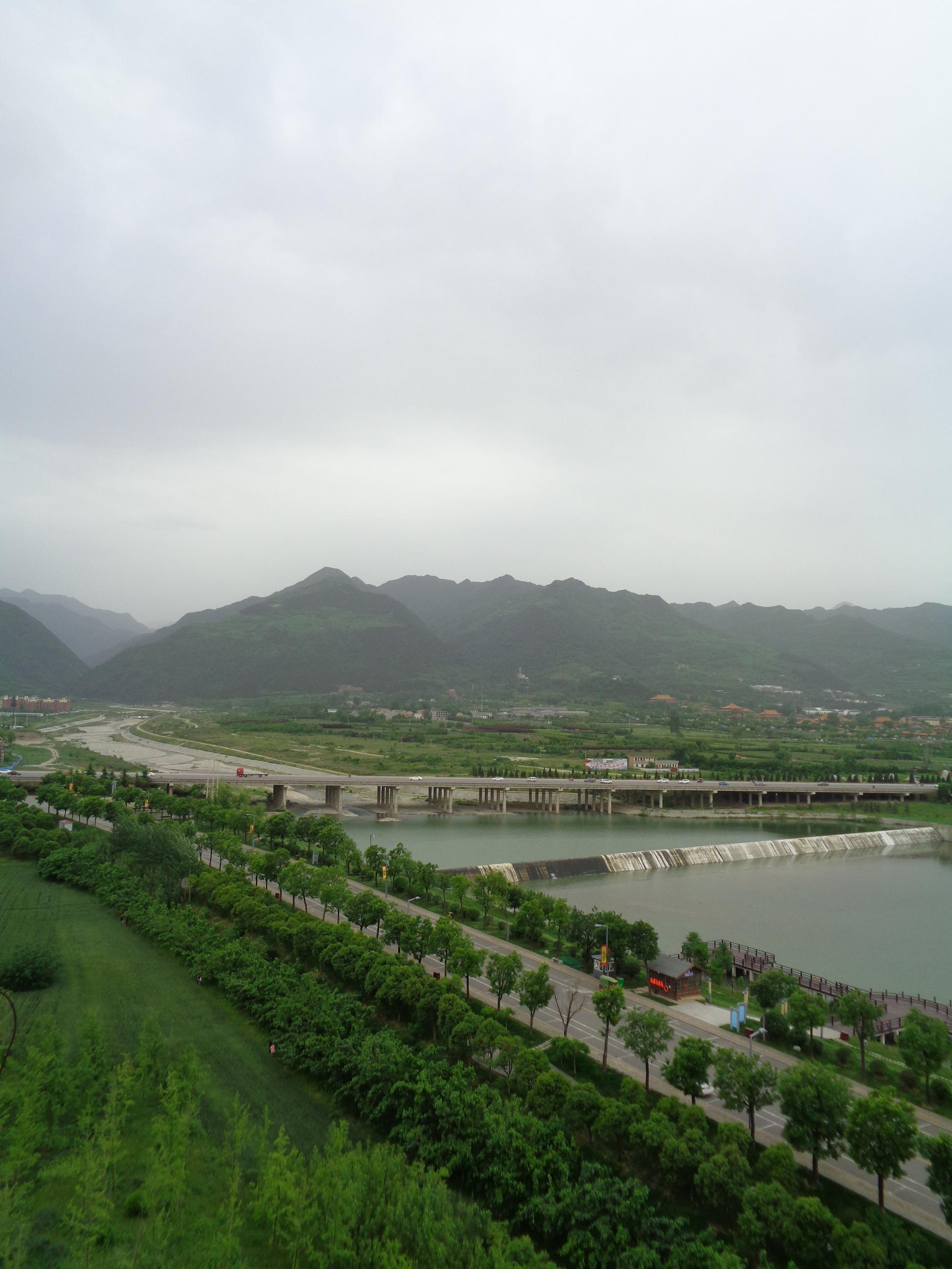 西安市周至县107省道 近郊楼观台